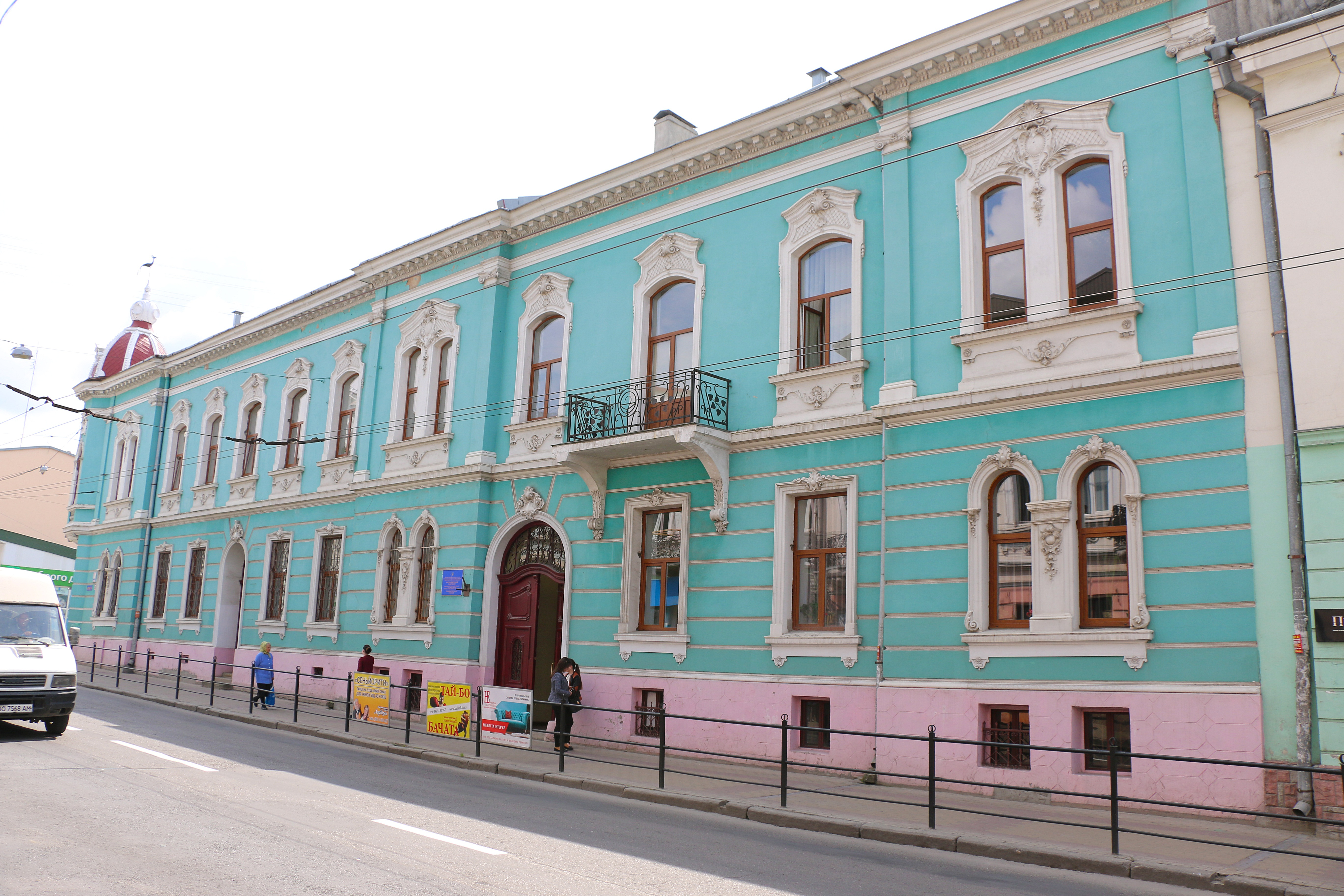 Житловий будинок (мур.), Тернопіль, вул. Руська, 36